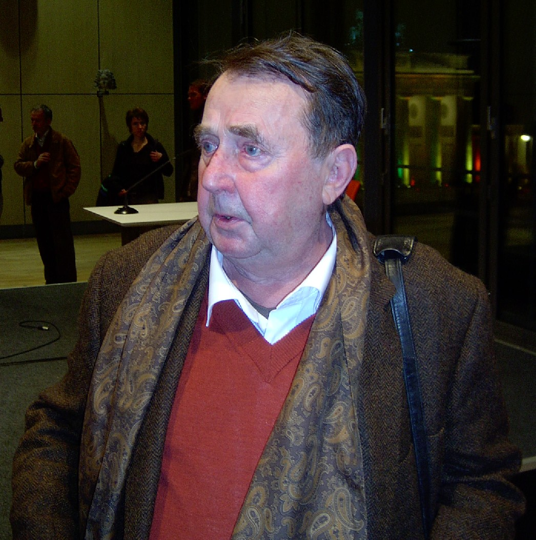 Der Bildhauer Werner Stötzer während einer Gedenkveranstaltung zum 100. Geburtstag von Fritz Cremer in der Akademie der Künste, Berlin.